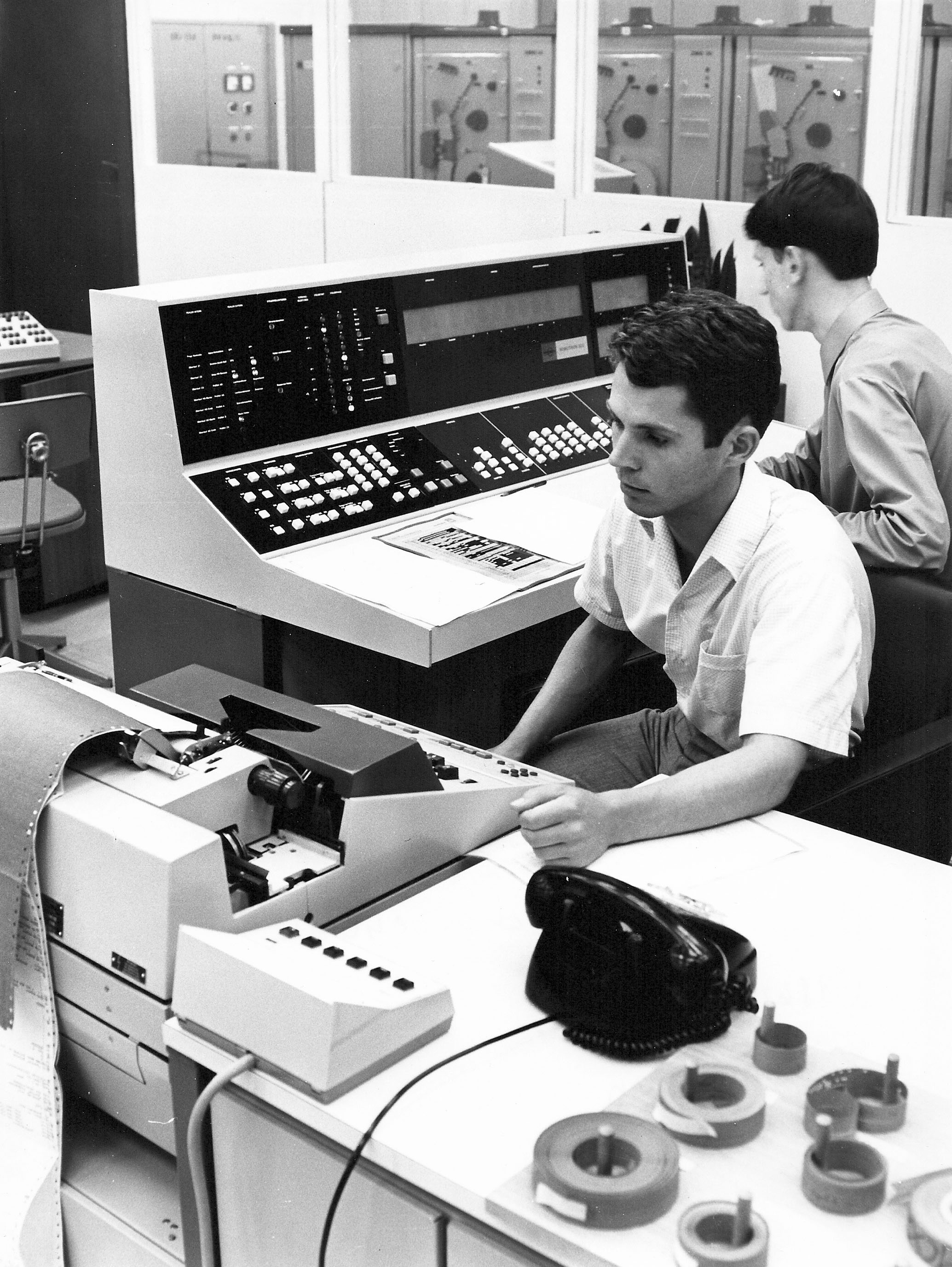 HfÖ - Rechenzentrum